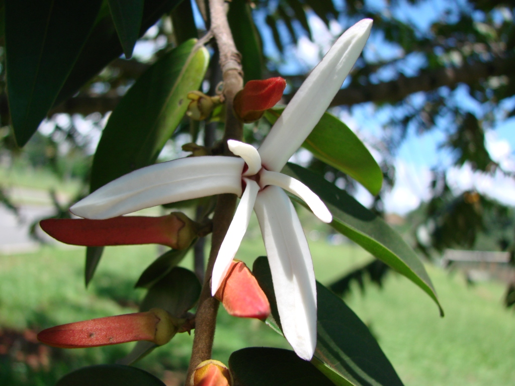 Xylopia aromatica - Annonaceae - Brasília - DF - Brasil